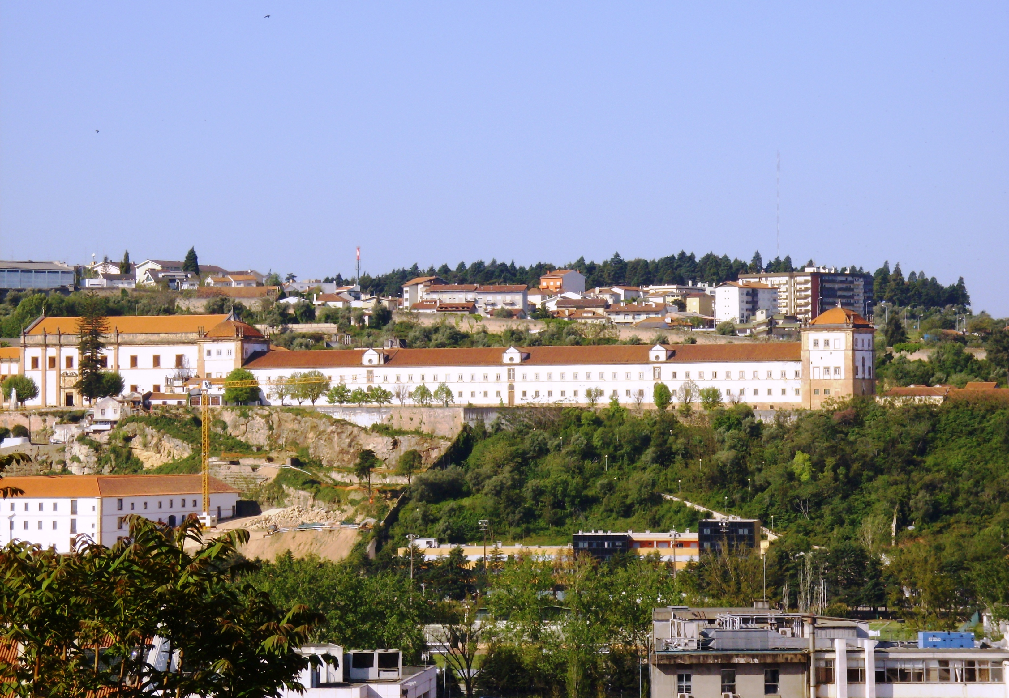 Convento de Santa Clara-a-Nova, freguesia de Santa Clara, cidade, concelho e distrito de Coimbra, Portugal.